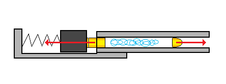 схемма отдачи свободного затвора.